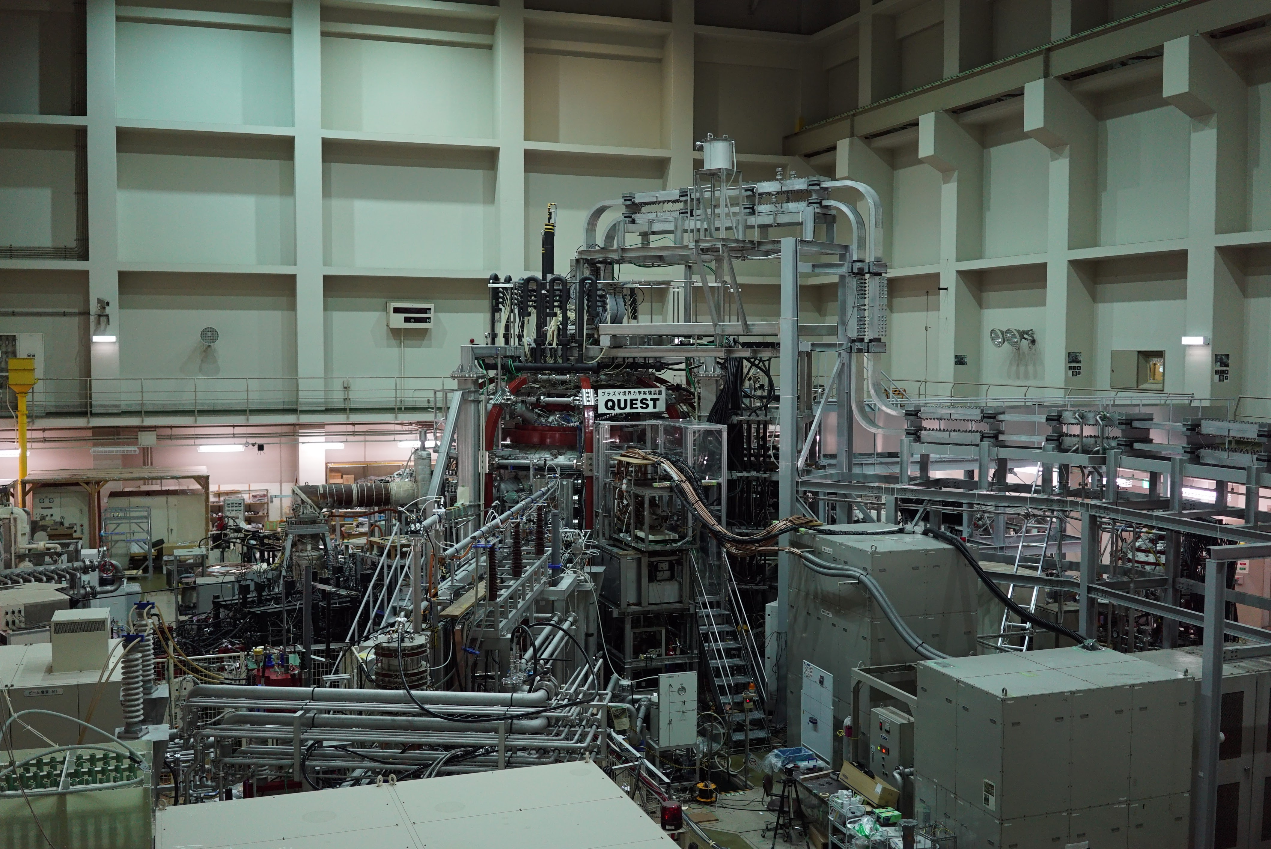 QUEST本体写真